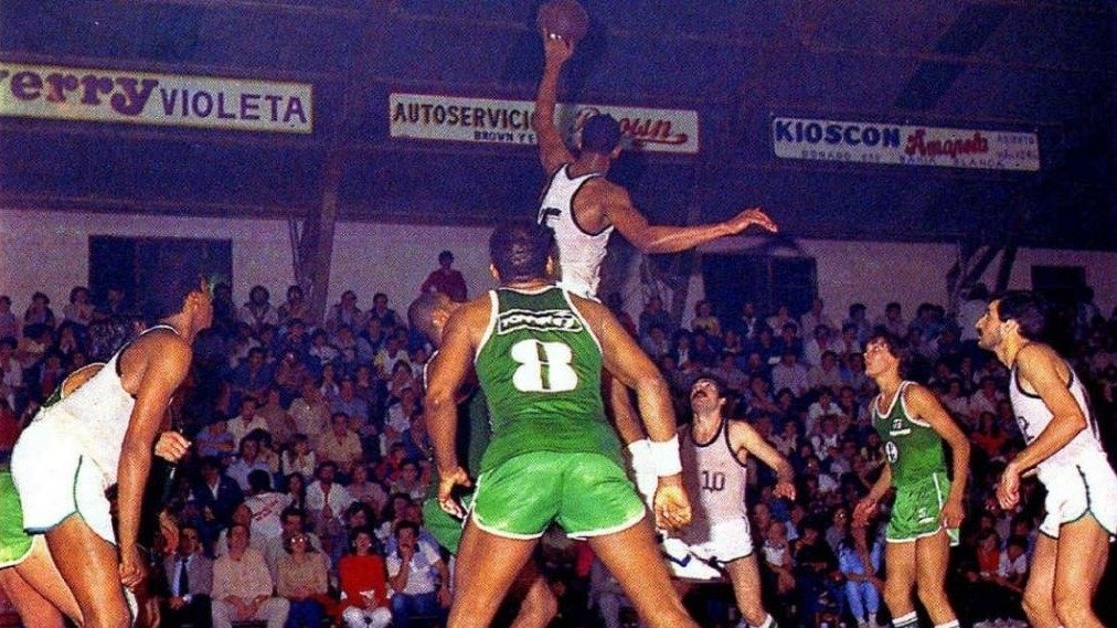 Foto de uno de los partidos inaugurales de la Liga Nacional de Básquet de 1985 en Bahía Blanca entre Pacífico y Atenas de Córdoba.